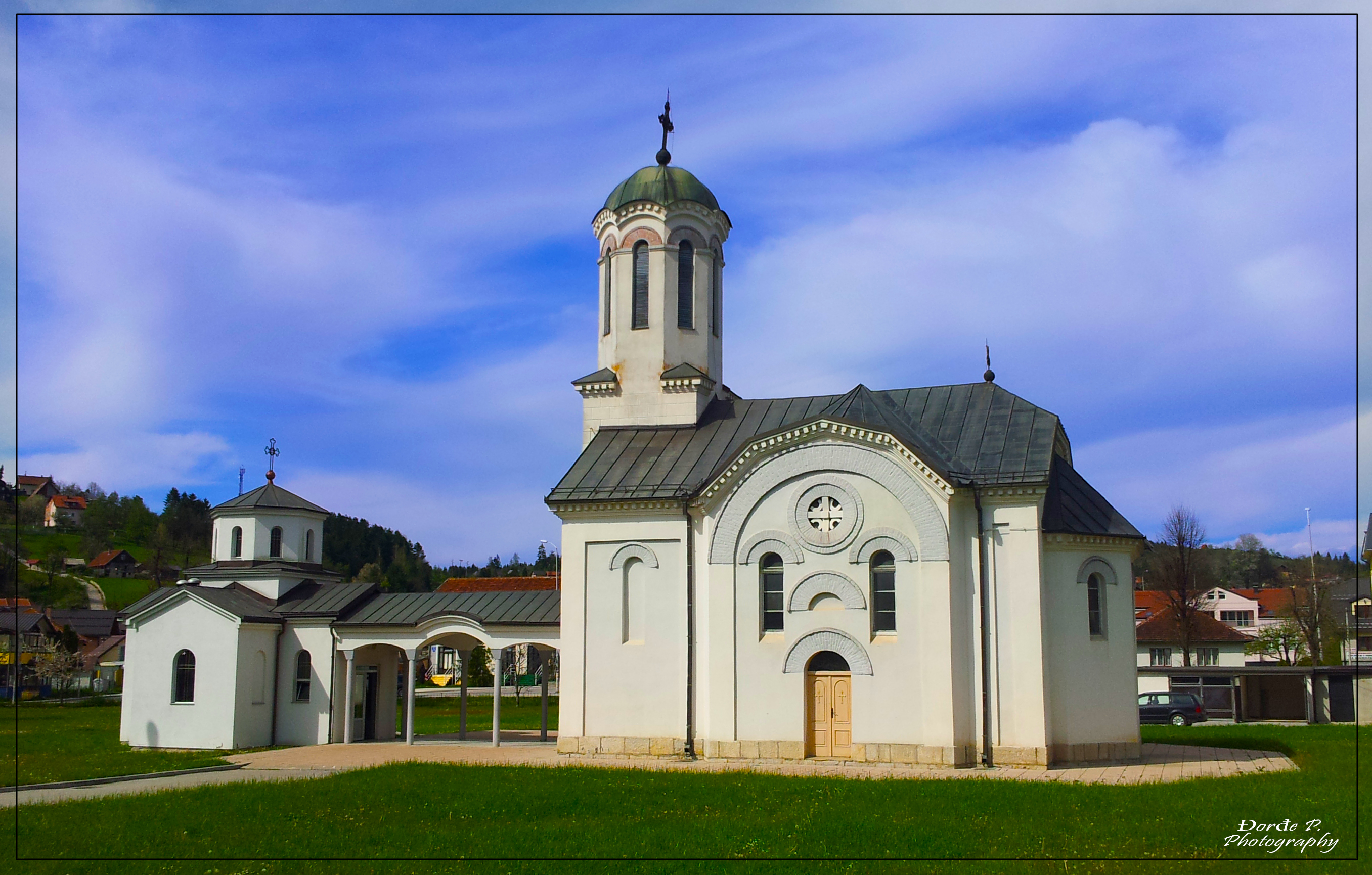 Crkva uspenja Presvete Bogorodice u Palama